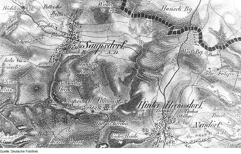 Original image description from the Deutsche Fotothek Kirnitzschtal-Saupsdorf. Oberreit, Sect. Stolpen, 1821/22